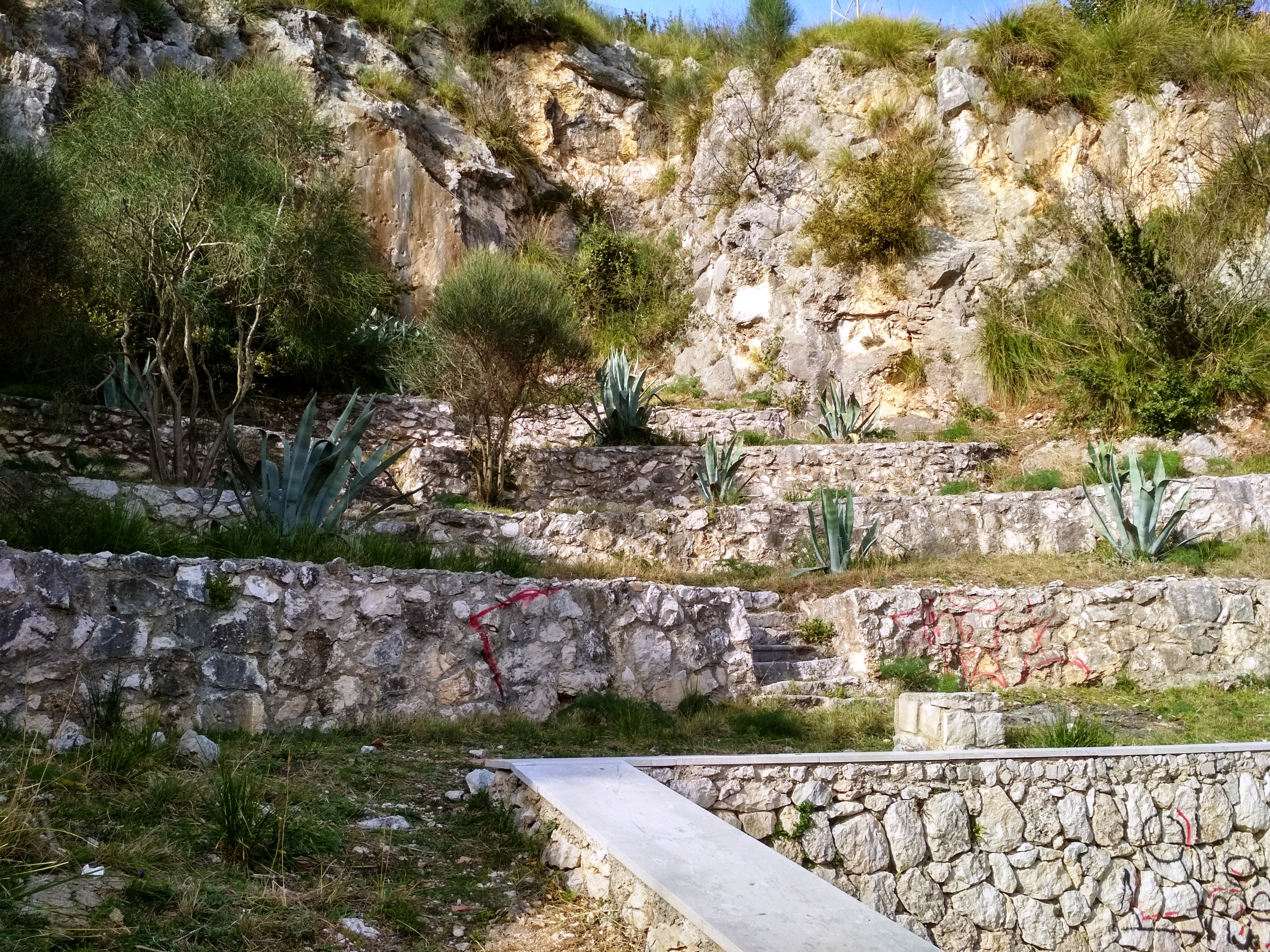 Veduta del Parco archeologico del Monte Cila di Piedimonte Matese (Caserta).